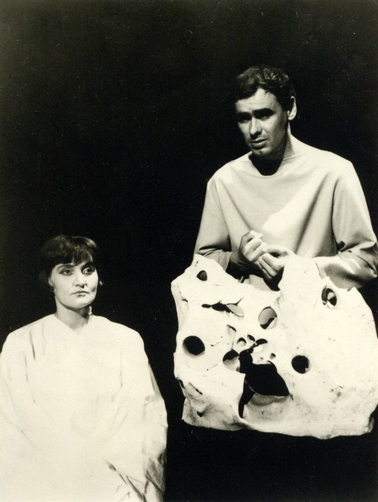 Dane Zajc, Otroka reke, Oder 57. Na fotografiji: Mija Janžekovič (Ženska), Danilo Benedičič (Dan).